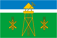 Флаг Владимирского сельского поселения, Краснодарский край, Россия.